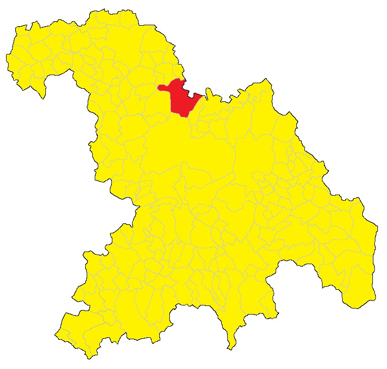 Mappa del comune di Valenza (AL)